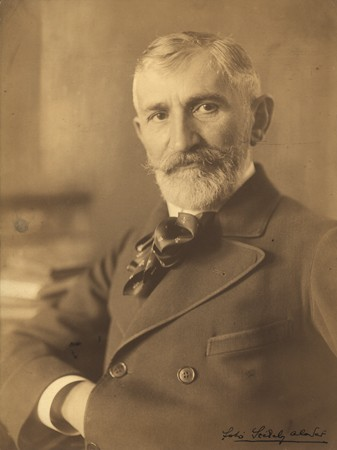 Portrait of Elek Benedek